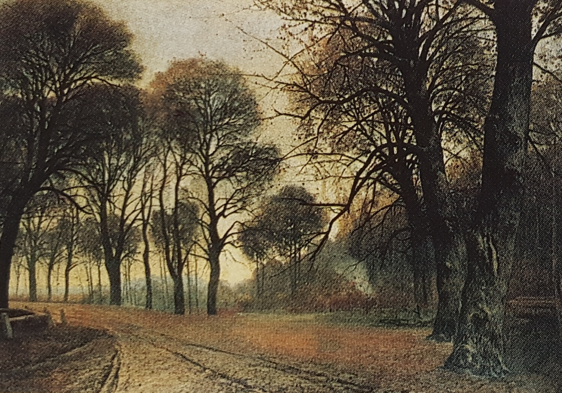 Skogslandskap målat av Gustaf Adelswärd